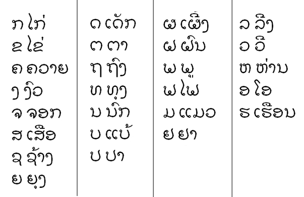 аксонлао